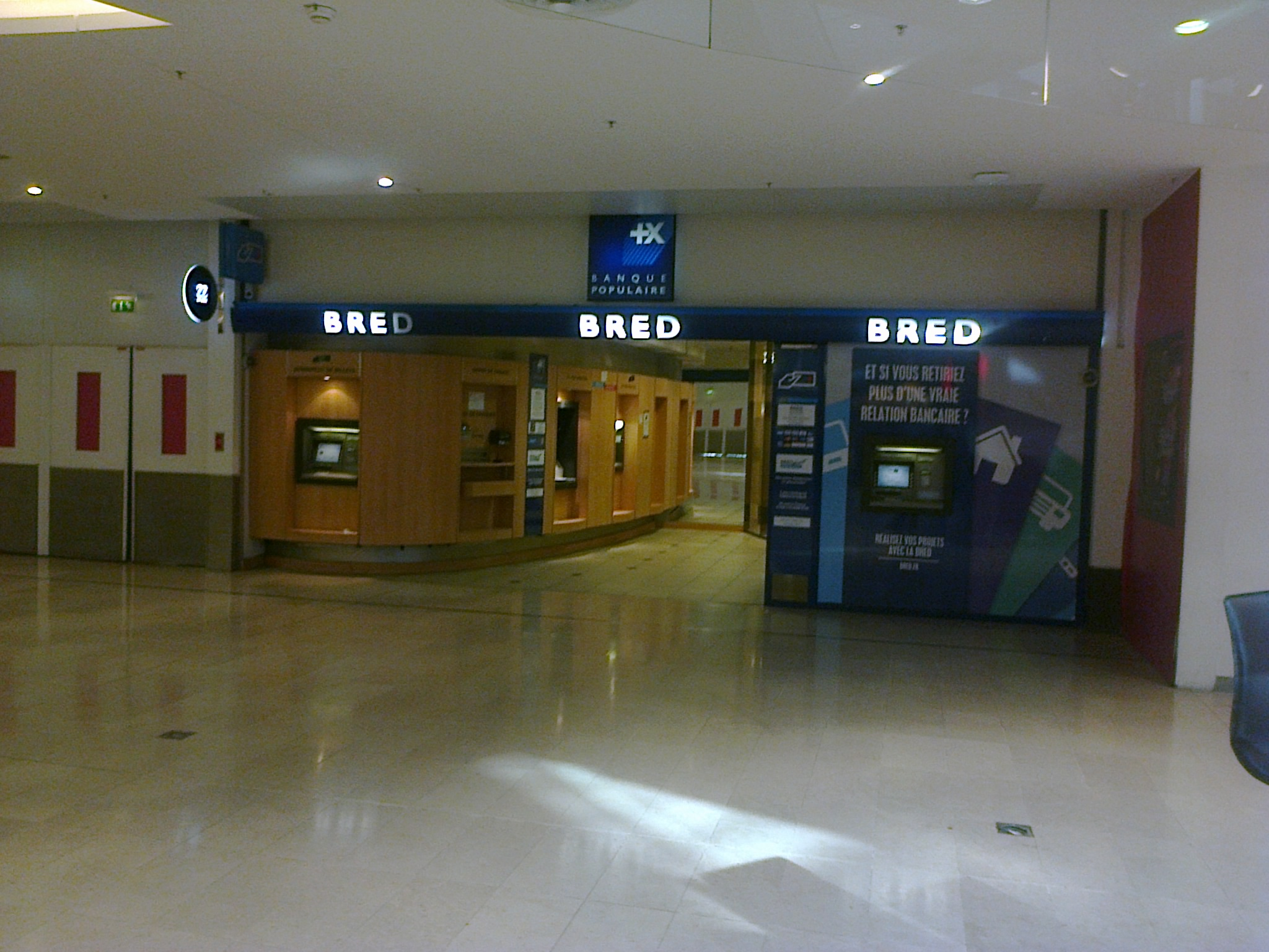 Agence de la BRED au centre commercial Les Quatre Temps à La Défense.